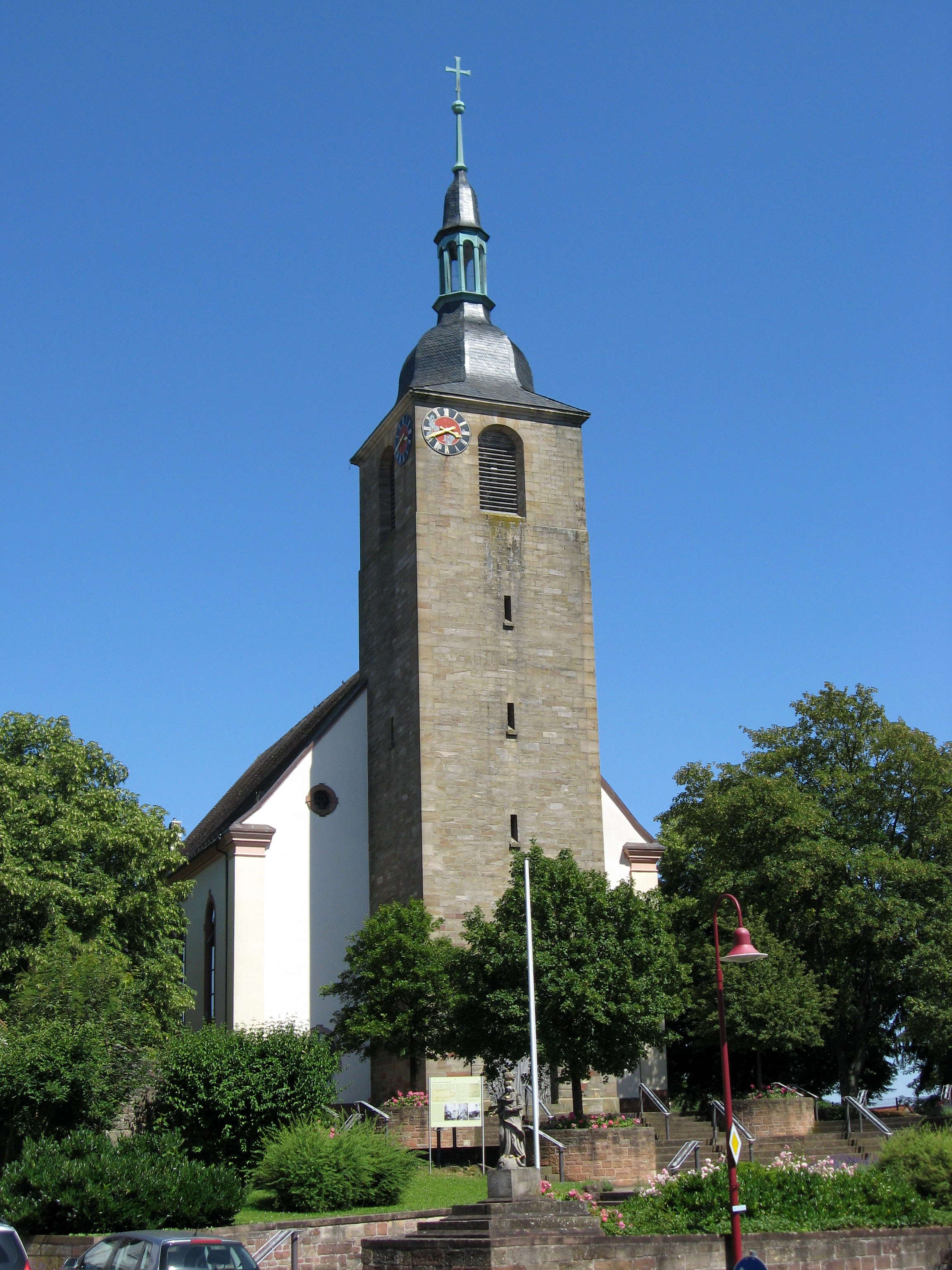 Katholische Pfarrkirche St. Leodegar in Steinfeld